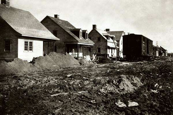 Construction d'Arvida, 1926. Le wagon sur rail était installé temporairement pour distribuer les matériaux.